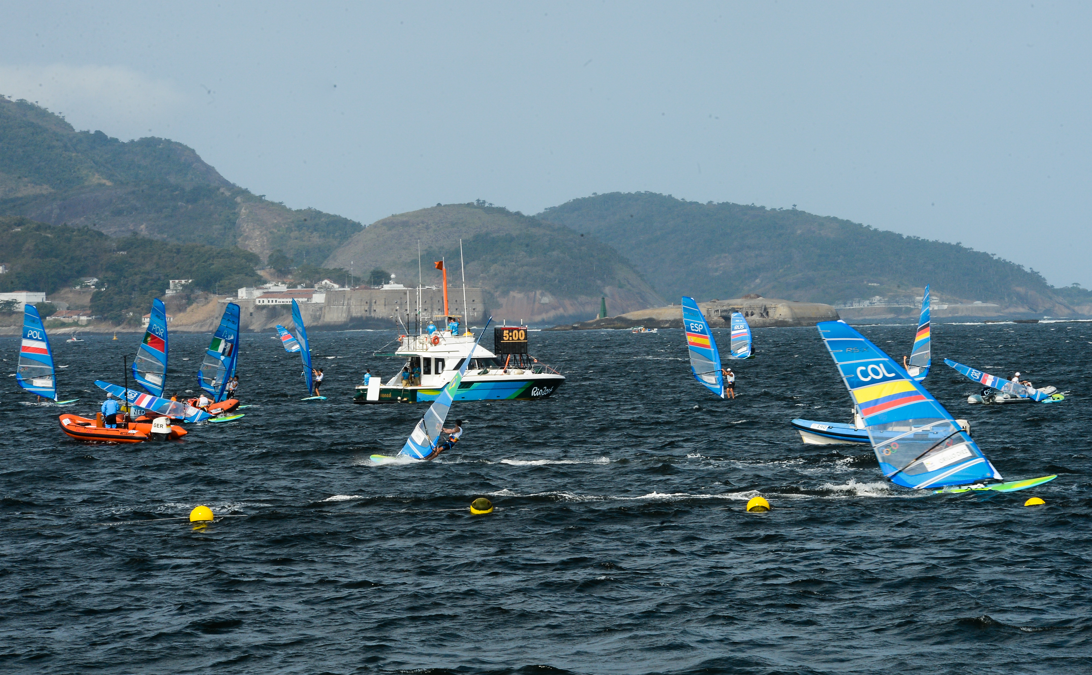 Rio de Janeiro - PÃºblico sem ingresso para os Jogos Rio 2016 assiste Ã competiÃ§Ã£o de vela na Praia do Flamengo (Tomaz Silva/AgÃªncia Brasil)